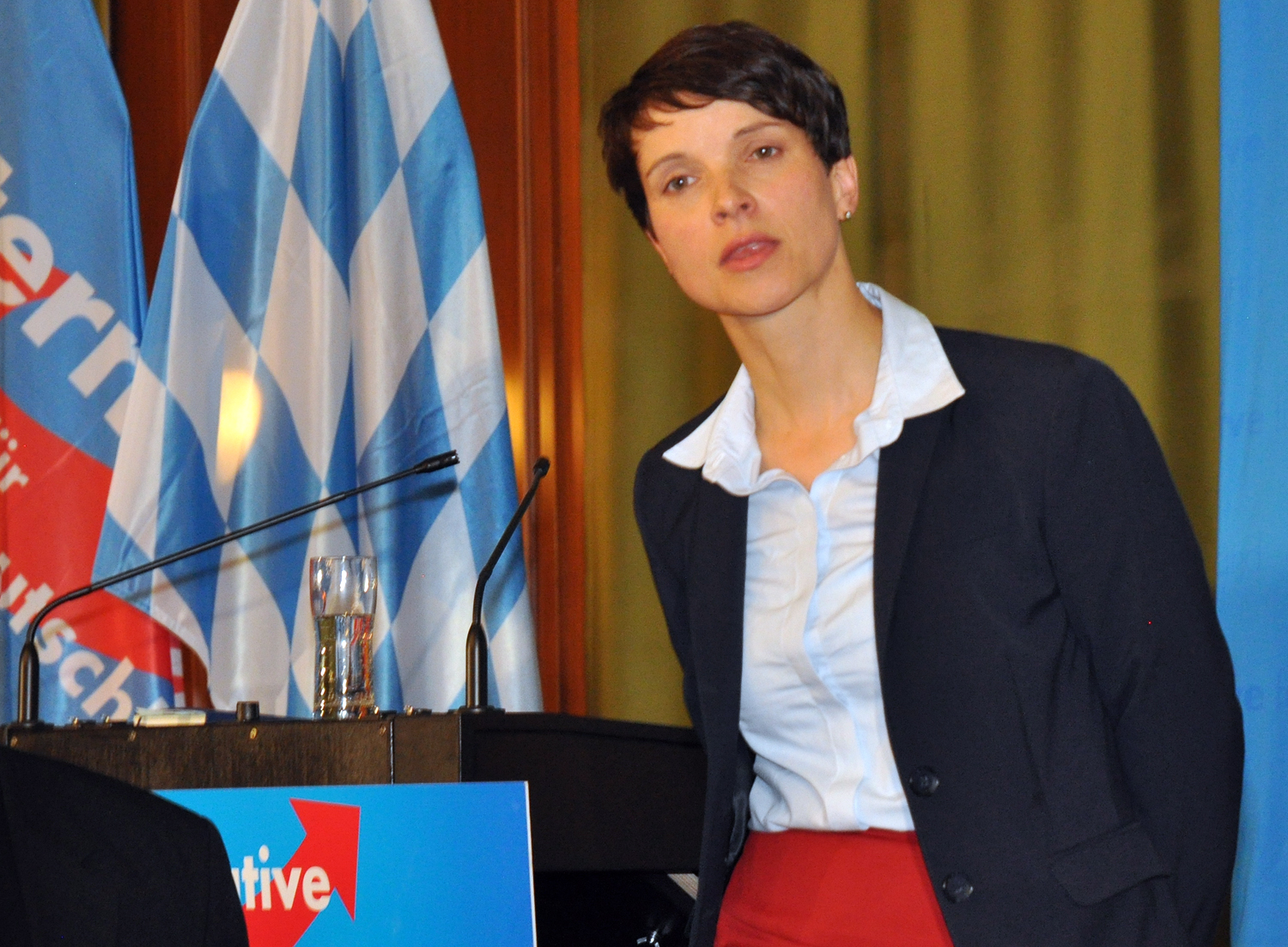 Frauke Petry bei einer Kundgebung der AfD im Münchner Hofbräukeller, 2016